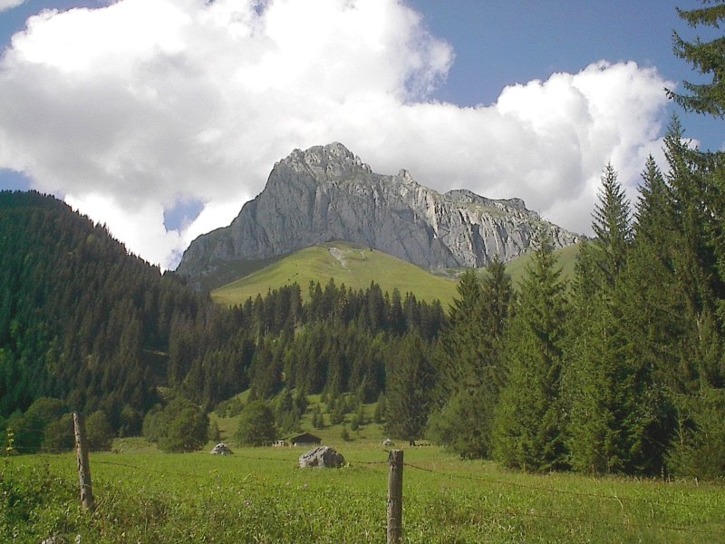 Les Cornettes de Bise (2432 m.) vues depuis Chevenne (commune de La Chapelle-d'Abondance) Photo J.J.Roland (23.08.2006)